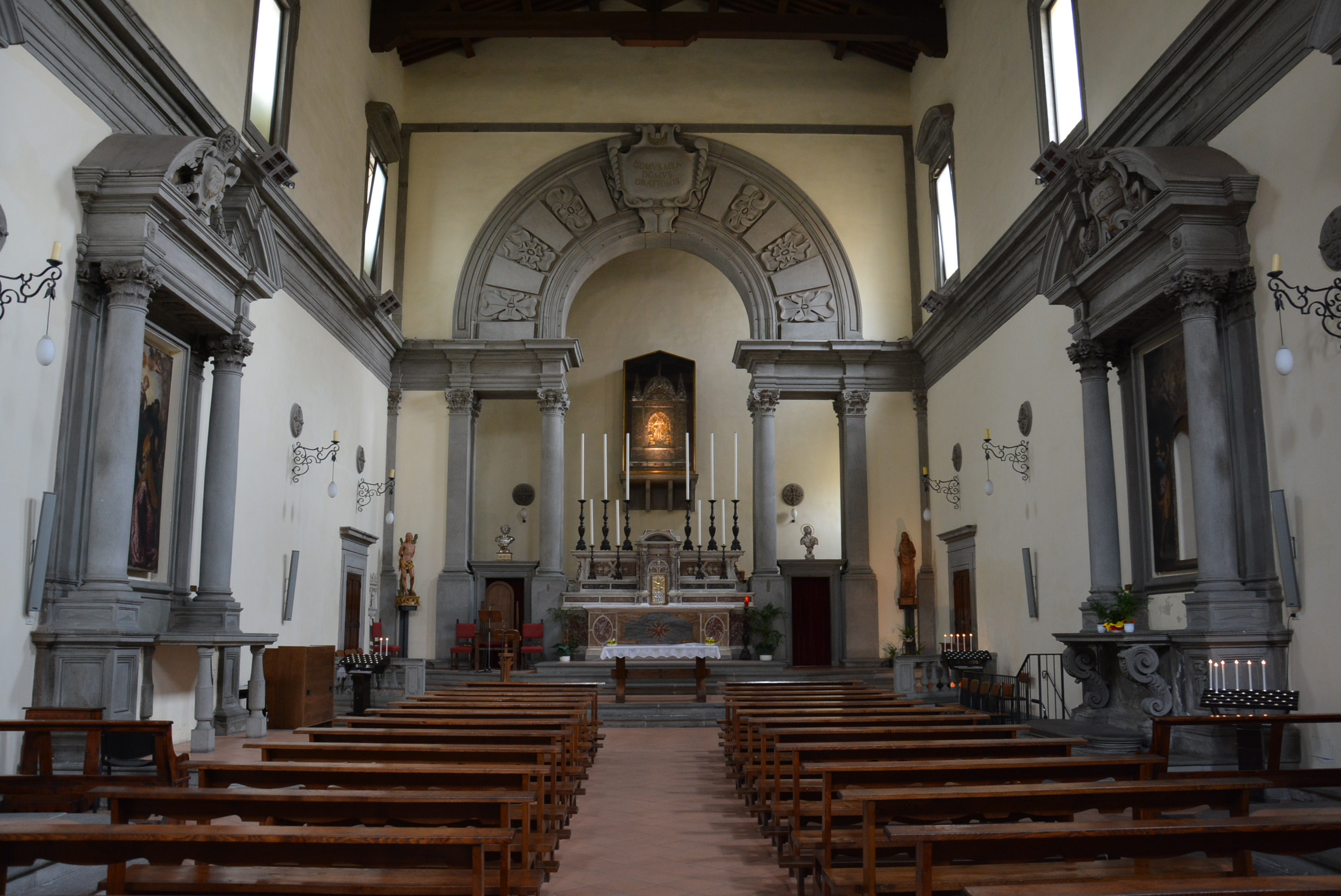 Santuario del Santissimo Crocifisso a Pontedera